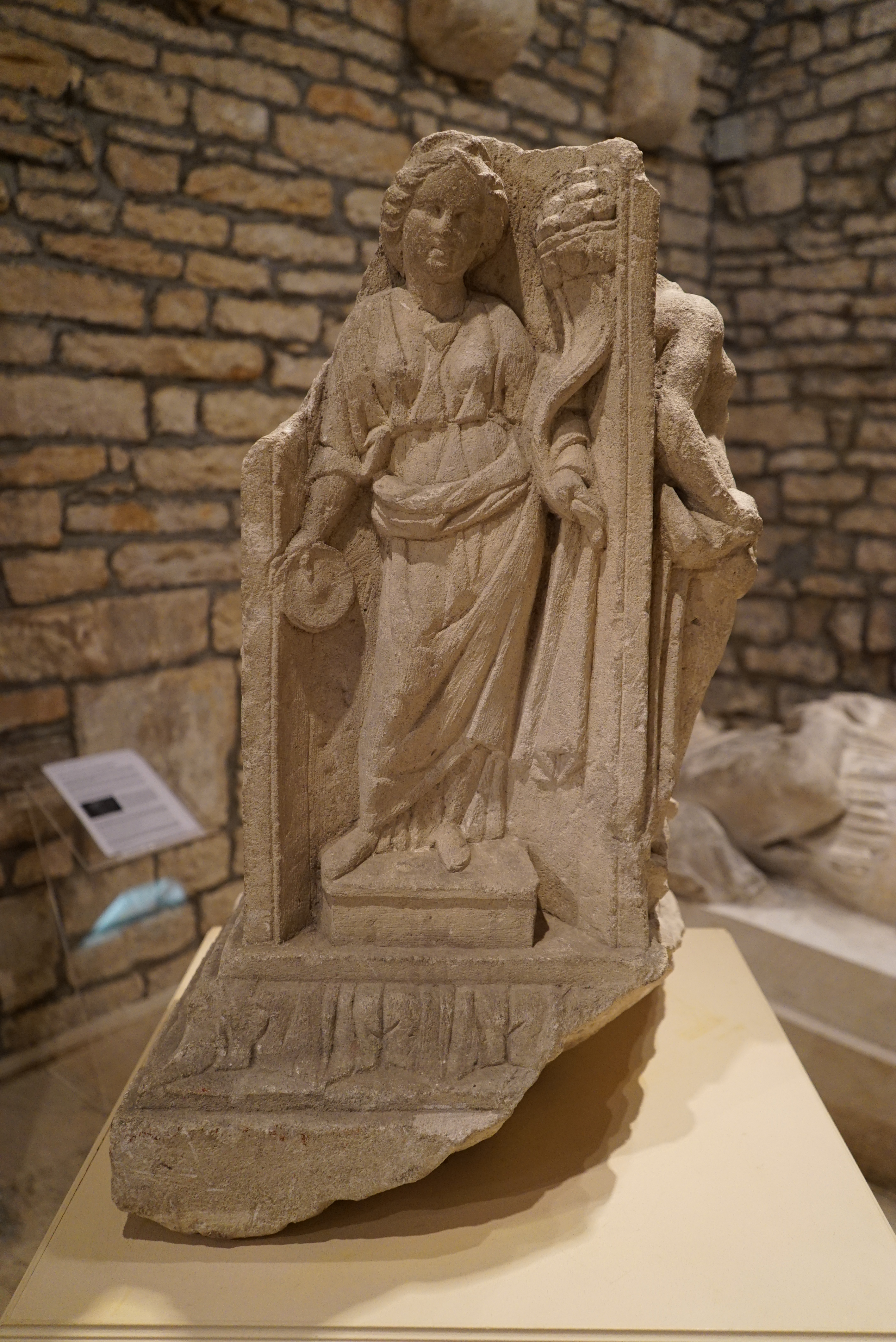 présenté au musée.